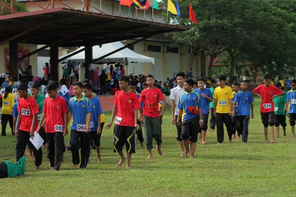 Majlis sukan SMK Hutan Kampong